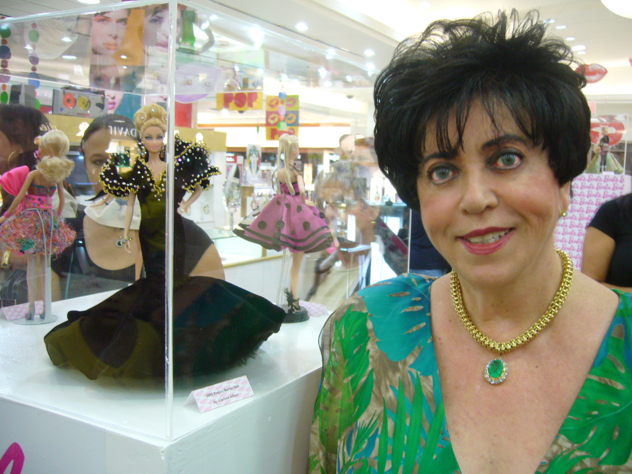 Traje ganador de la Diseñadora de Modas, la puertorriqueña Carlota Alfaro. La competencia de los 50 años de la Barbie celebrado en San Juan, Puerto Rico. "Project Barbie Fashion Design Competition 2009".